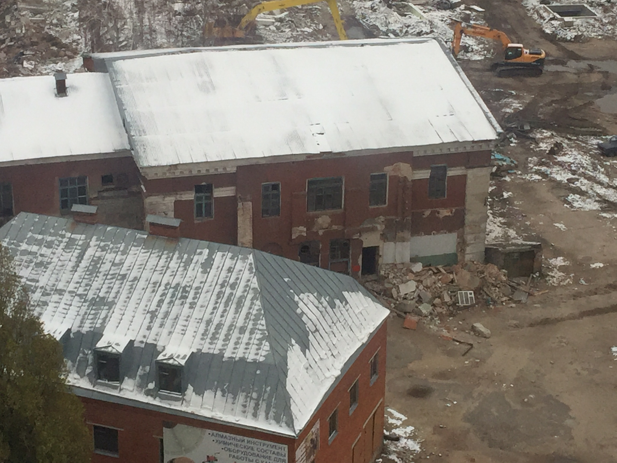 Церковь Рождества Христова на Придаче: улица Димитрова, 51, Воронеж, Воронежская область